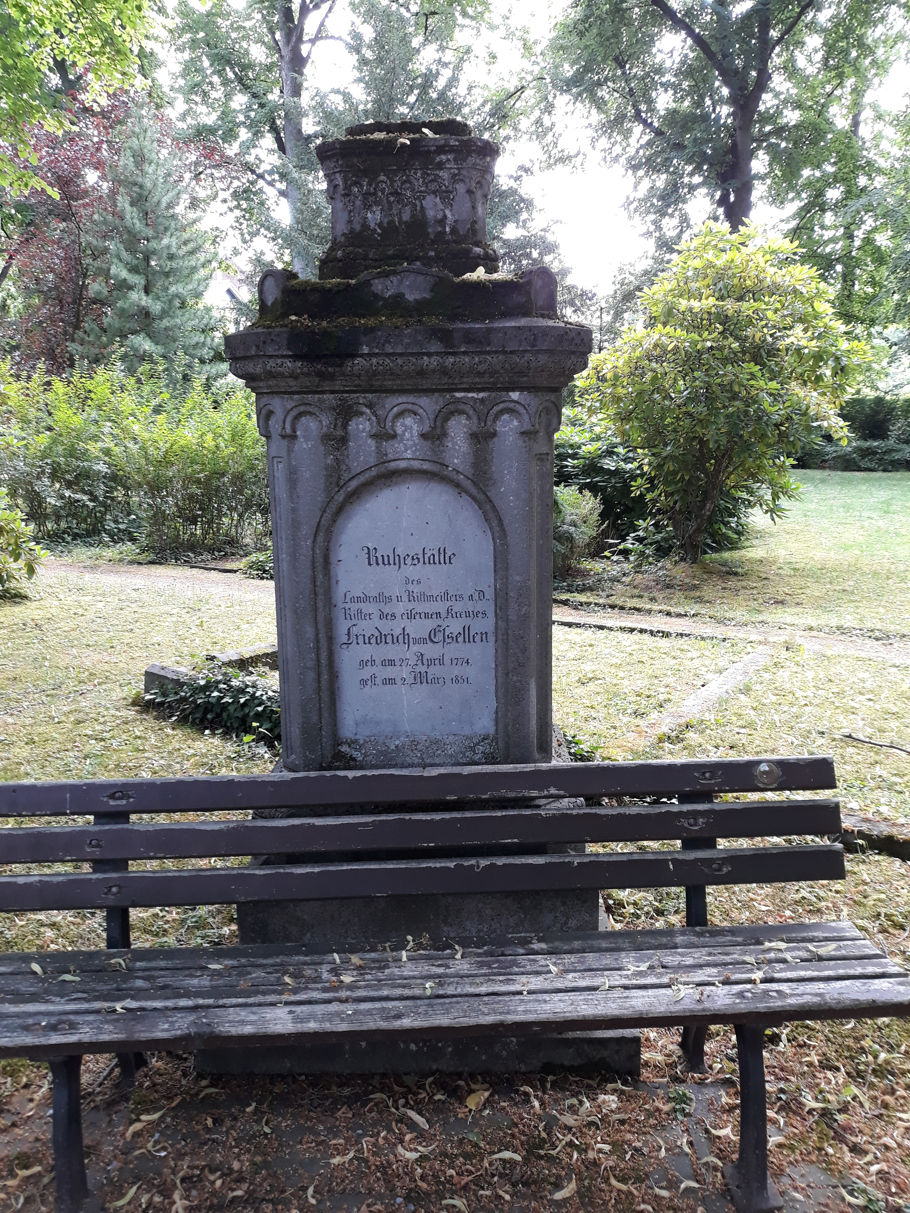 Das Grab des preußischen Landrates Friedrich von Essellen auf dem Osthofenfriedhof in Soest.